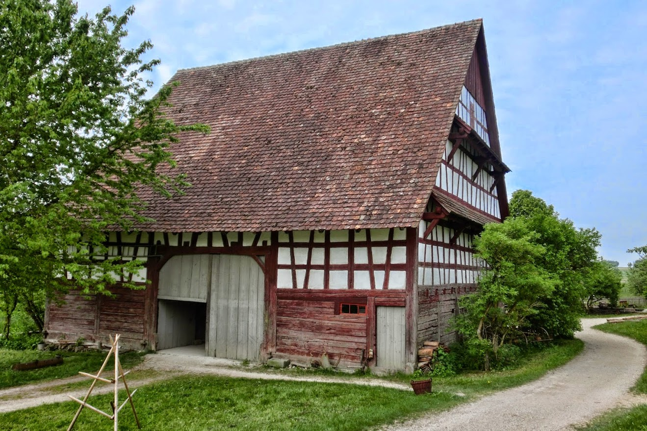 Deutschland - Baden-Württemberg - Landkreis Tuttlingen - Neuhausen ob Eck: Freilichtmuseum - Stallscheune